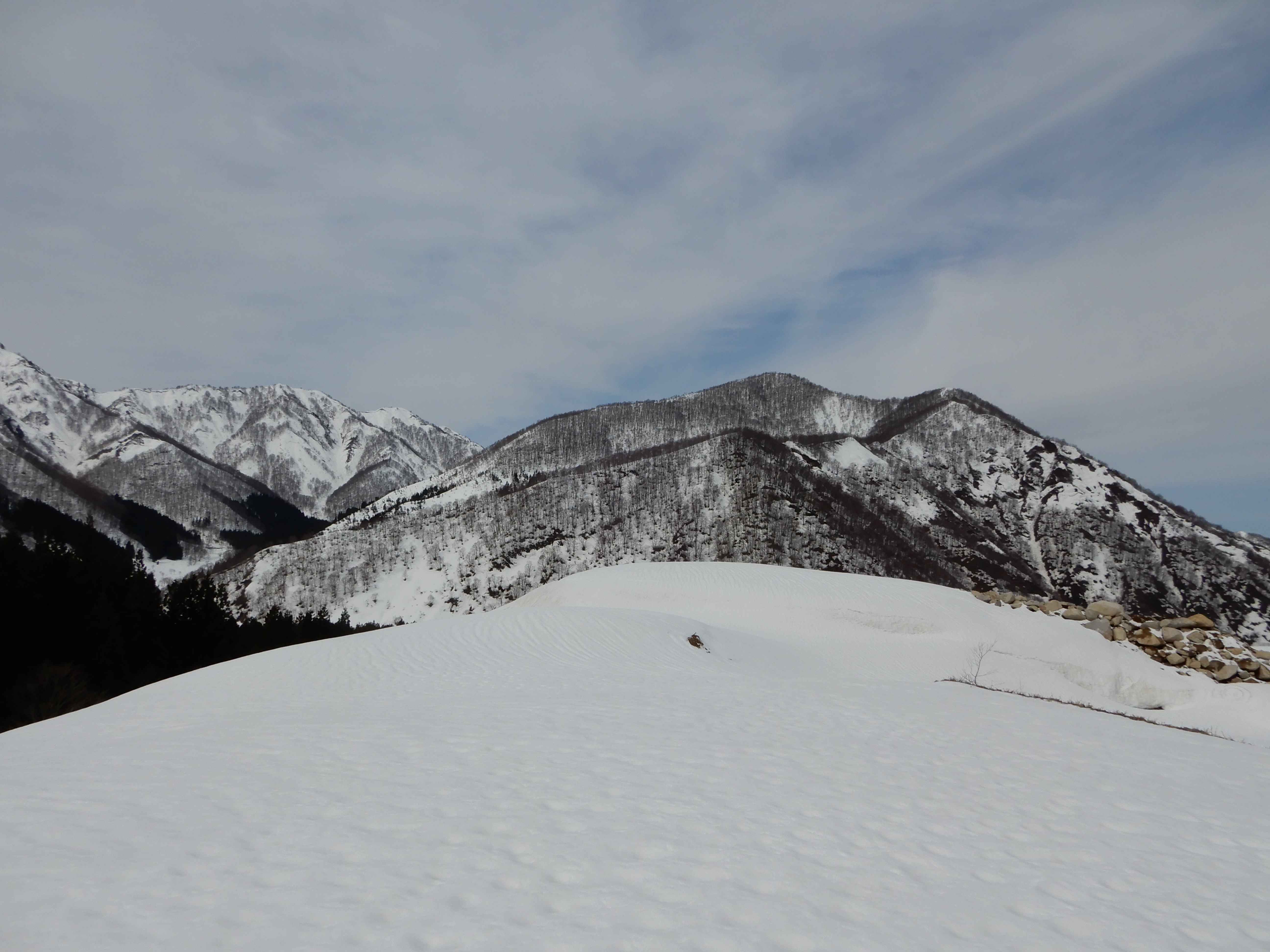 無黒山 2019-03-26